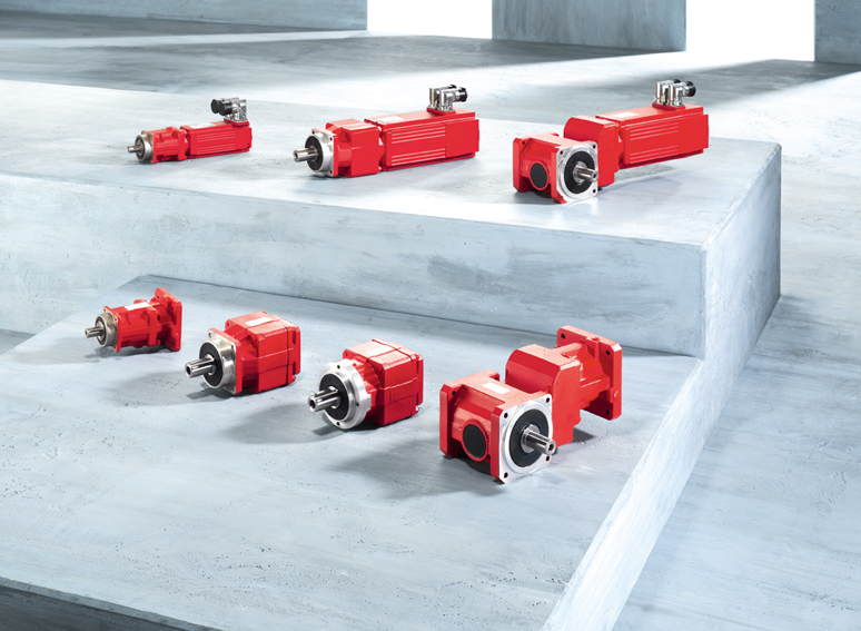 Servogetriebebauformen